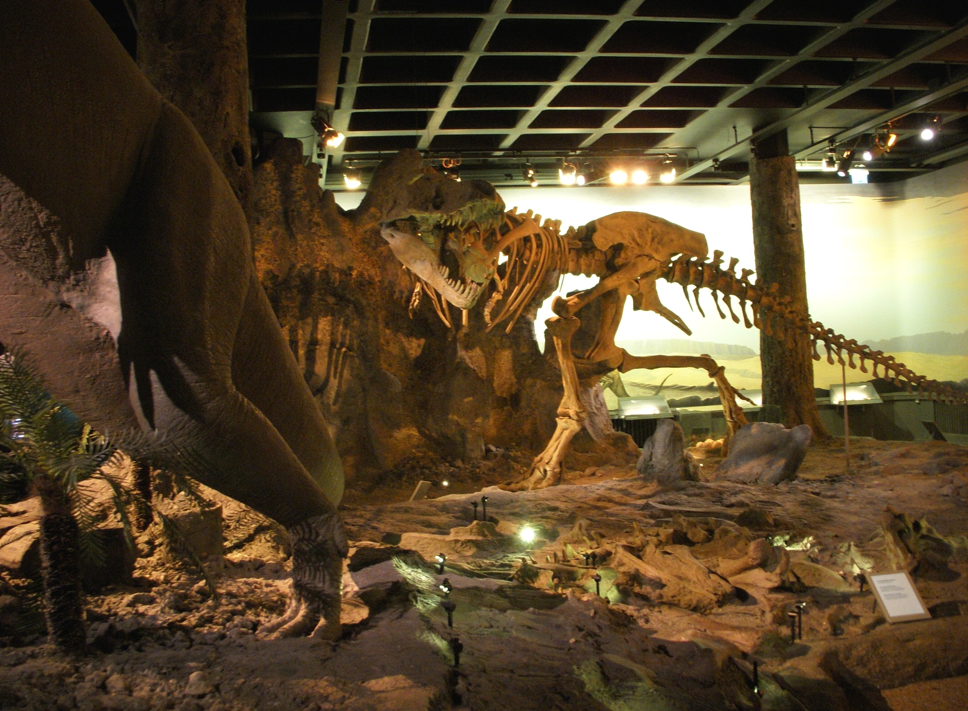 Naturhistoriska Riksmuseet i Stockholm, utställningar